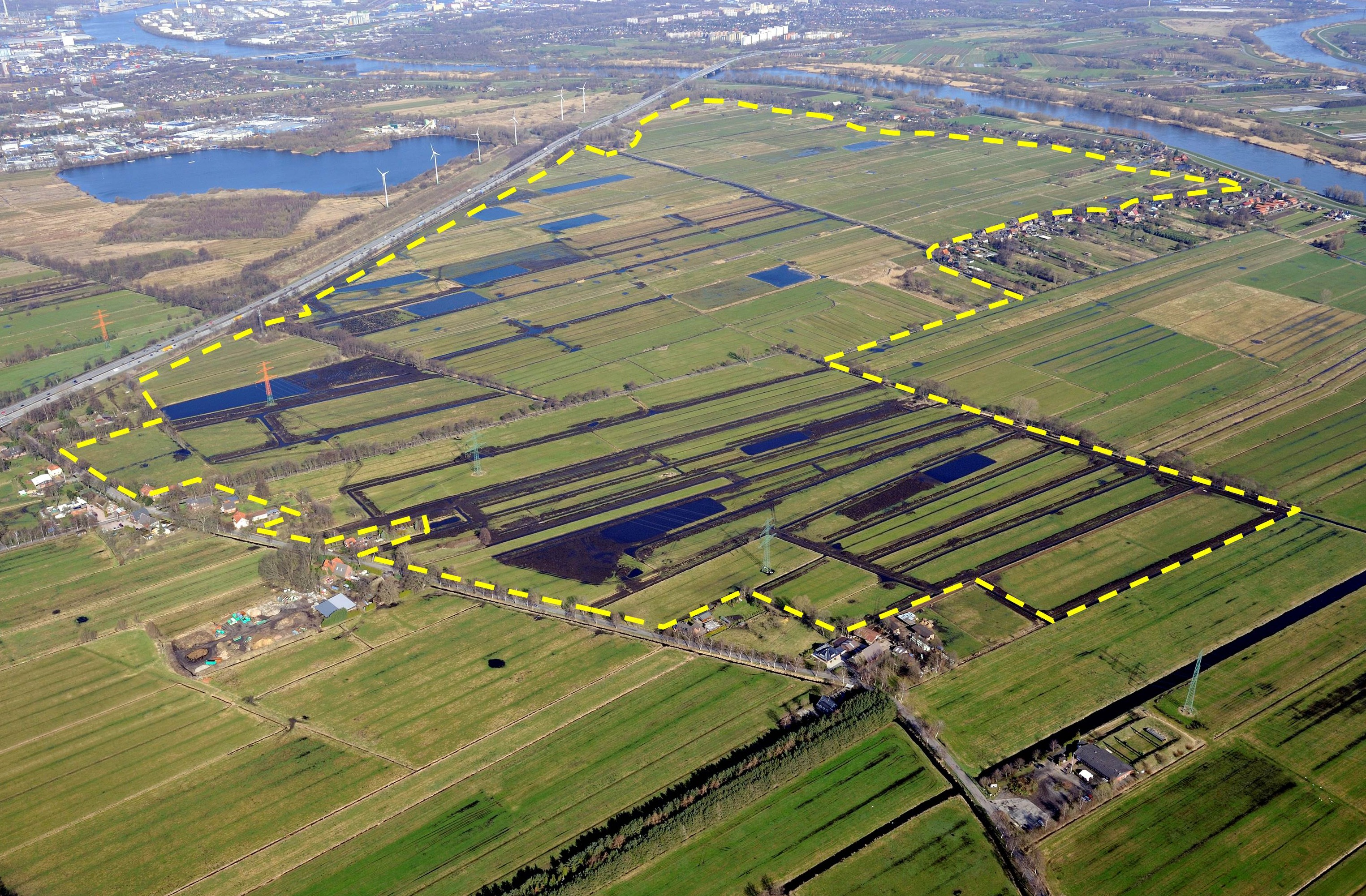 NSG Neuländer Moorwiesen: Schutzgebietsgrenzen gelbe Strichlinie. Schrägluftbild Richtung Norden. Unten: Großmoordamm, links Autobahn A1, oben: Süderelbe